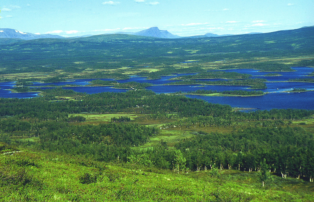 Wildnis im Vindelfjäll-Naturreservat, Schweden